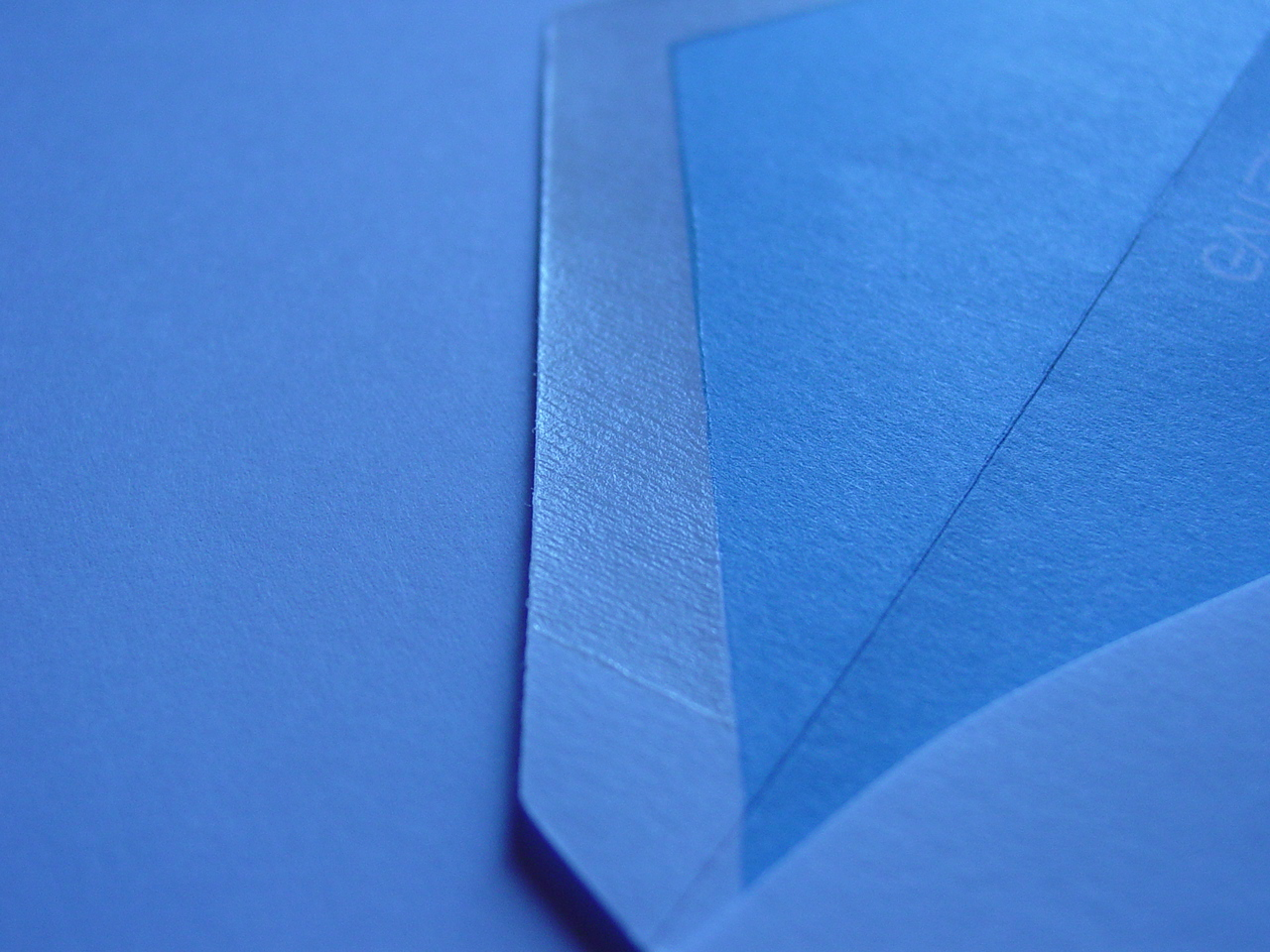 Plakrand van een enveloppe